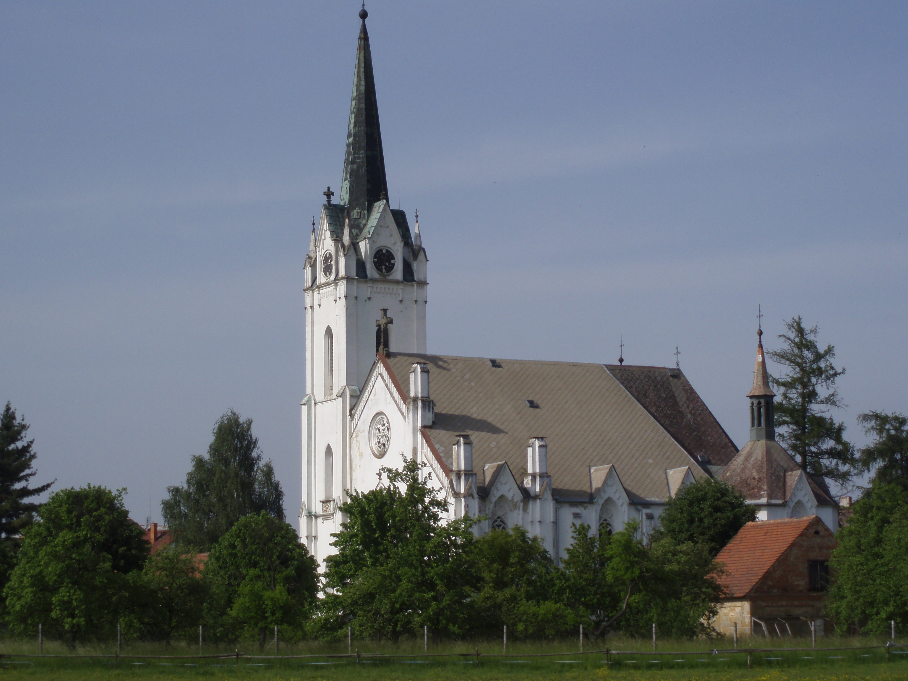 Kostel svatého Fabiána a Šebastiána Zákupy